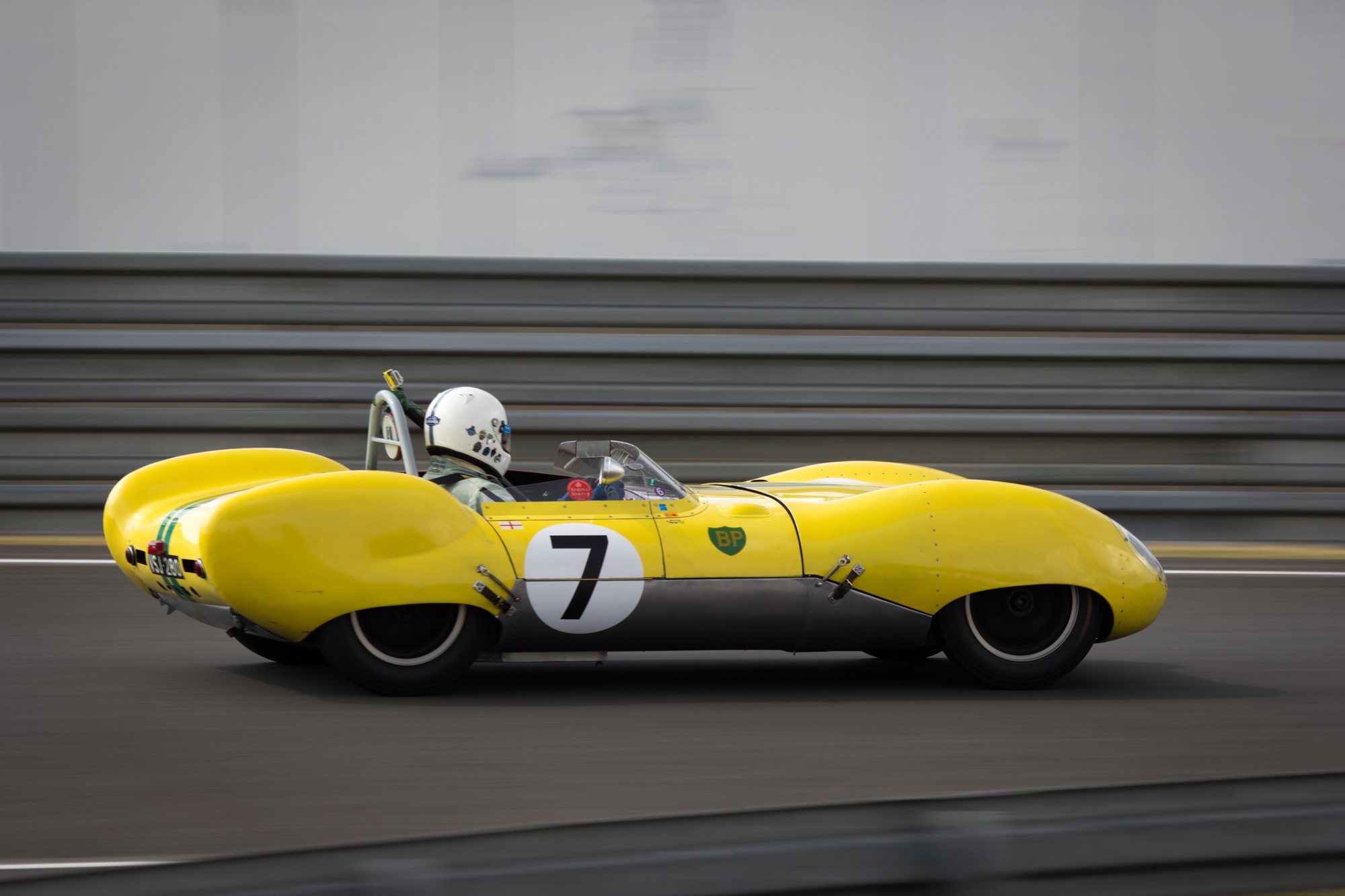 Le Mans Legend 2015 Drivers: David Cooke, Neil Twyman